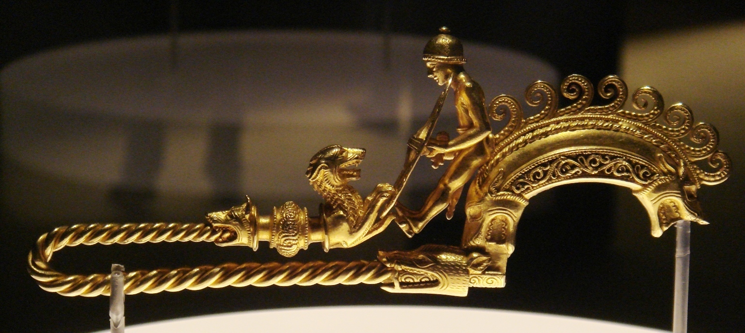 Fíbula de Braganza, 250-200 a.C. Arte griego helenístico en la Península Ibérica, British Museum, Londres